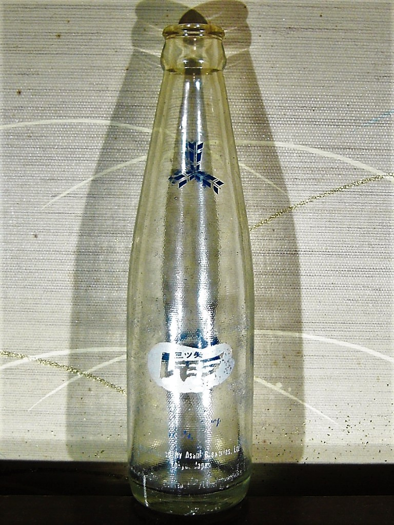 三ツ矢レモラ リターナブル瓶